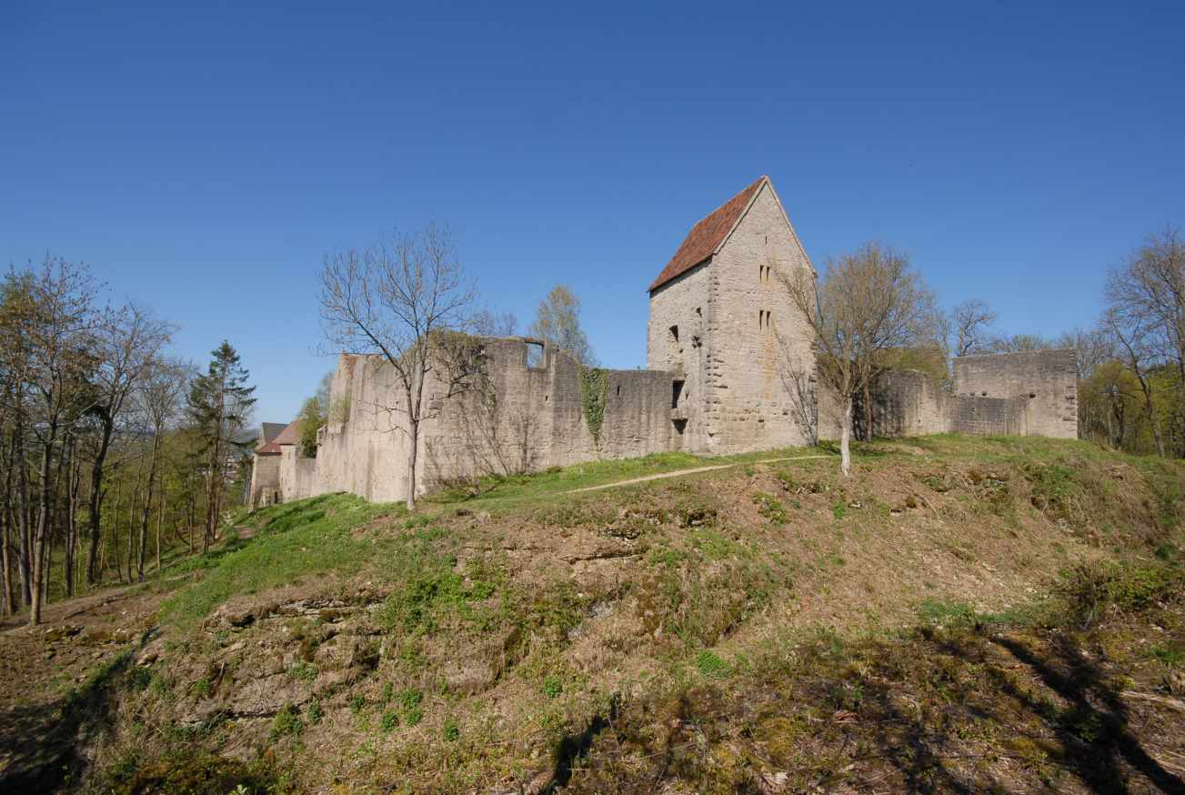 Burg Salzburg.Bad Neustadt, Salzburg NordOstEcke